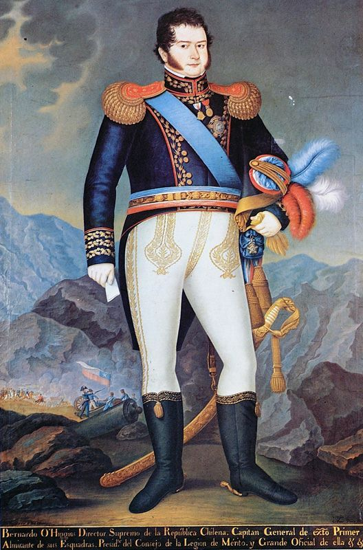 Retrato de Don Bernardo O'Higgins. Oleo sobre tela del pintor limeño José Gil de Castro(1785-1850) Colección: Museo Histórico Nacional de Chile.